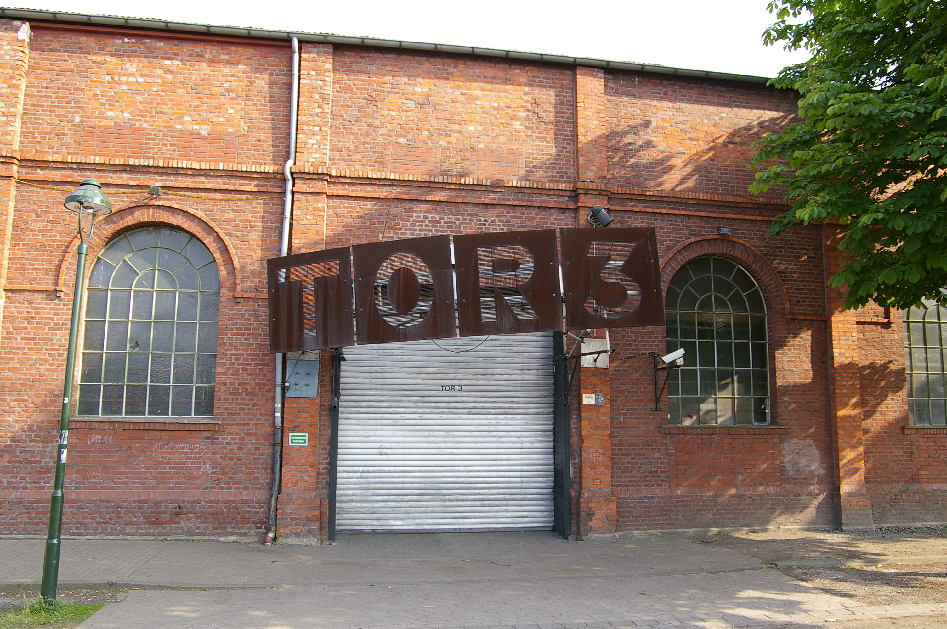 Genehmigung: GFDL (Version 1.2, November 2002), kein wie auch immer geartetes "Gentlemen-Agreement". Bildnutzung ohne Einhaltung der Bestimmungen der GFDL ist kostenpflichtig und wird vom Rechteinhaber in Rechnung gestellt. Zweitlizensierung ggf. auch unentgeltlich auf Anfrage. Es gelten die AGB. Motiv: Tor3 Düsseldorf